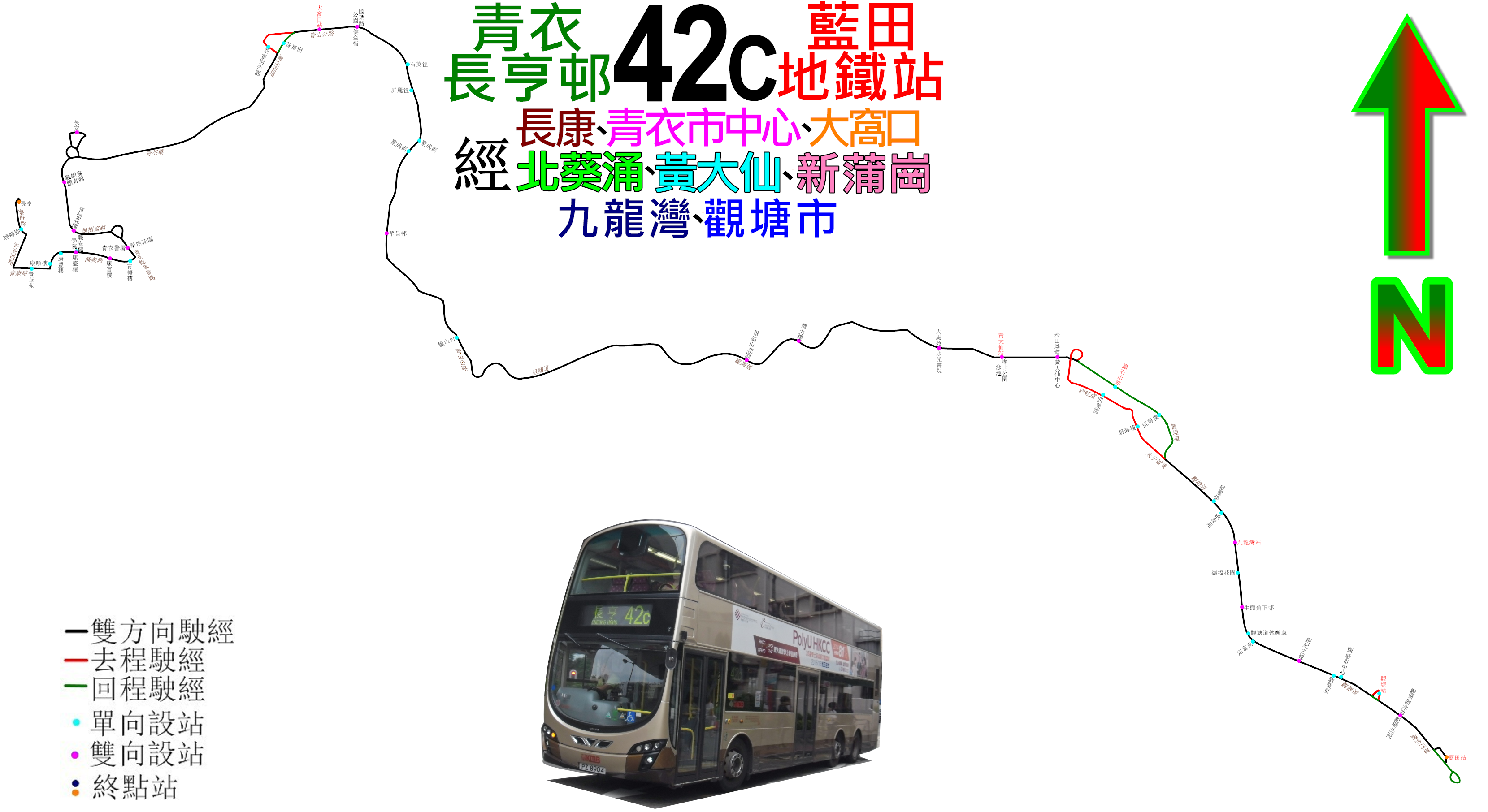 中文（香港）: 九巴42C線的走線圖